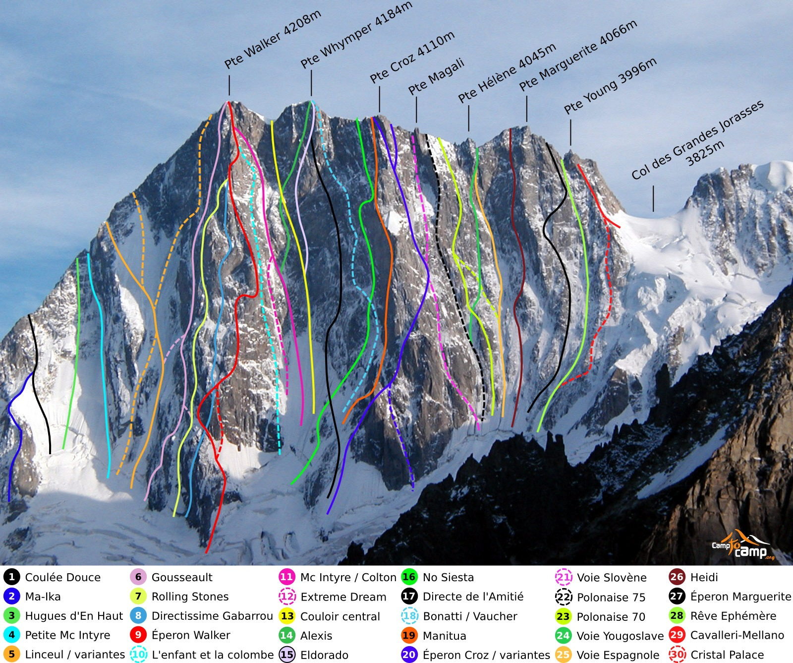 Tracé de la plupart des voies en face nord des Grandes Jorasses